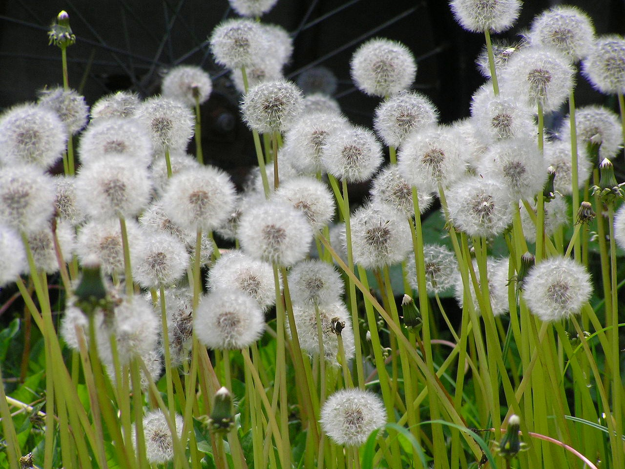 タンポポ（蒲公英）は、キク科タンポポ属 (Taraxacum) の多年生植物の総称である。なお、英名のdandelionはフランス語で「ライオンの歯」を意味するdent-de-lionに由来するが、これはギザギザした葉がライオンの牙を連想させることによる。 花言葉は、「思わせぶり」。